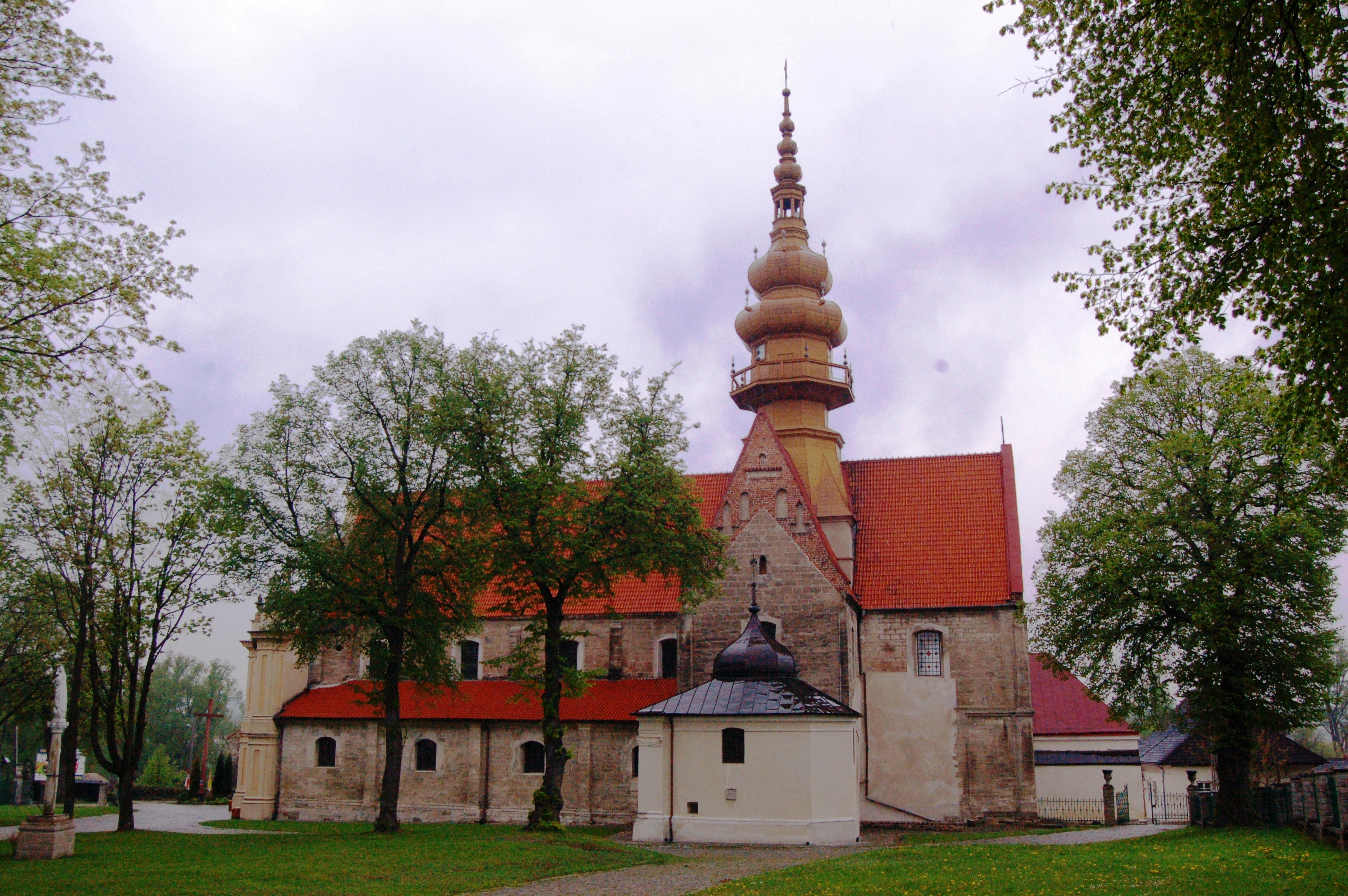 Klosterkomplex Zisterzienser, Koprzywnicy